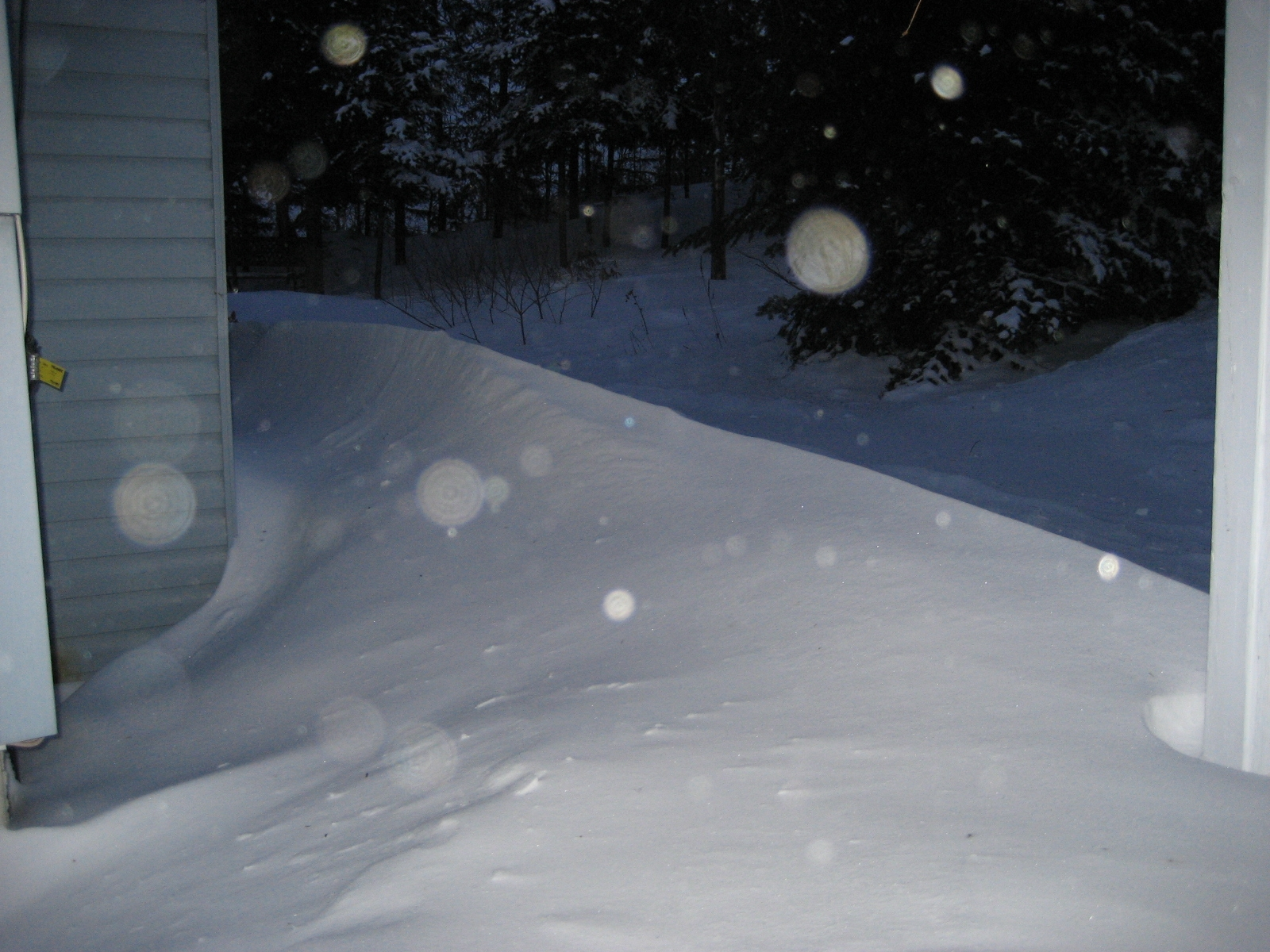 Congère, accumulation de neige en Abitibi, Preissac, Québec, Canada. Hiver 2007